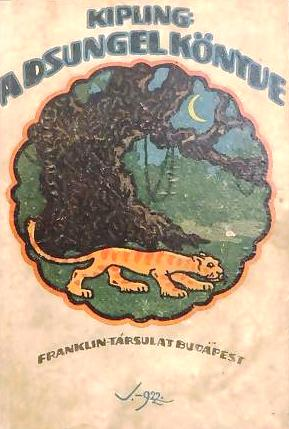 Rudyard Kipling: A dzsungel könyve, kiadta a Lampel R. (Wodianer F. és Fiai) R. T. Könyvkiadóvállalata